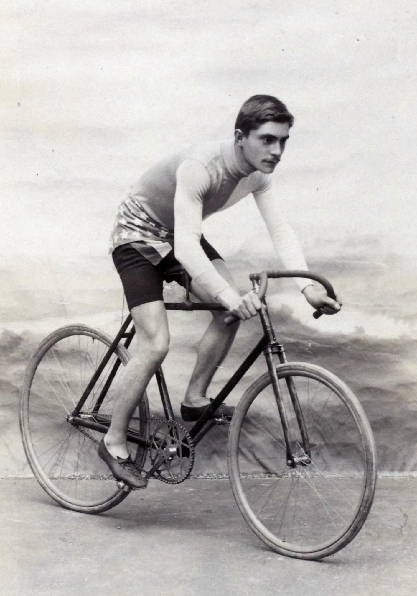 Champion amateur demi-fond